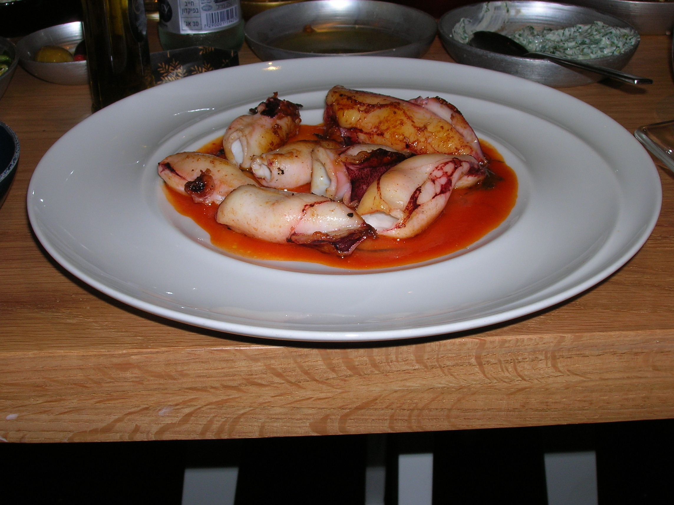 קלמרי על הפלנצ'ה, עם קרם עגבניות פיקנטי וריחן סגול